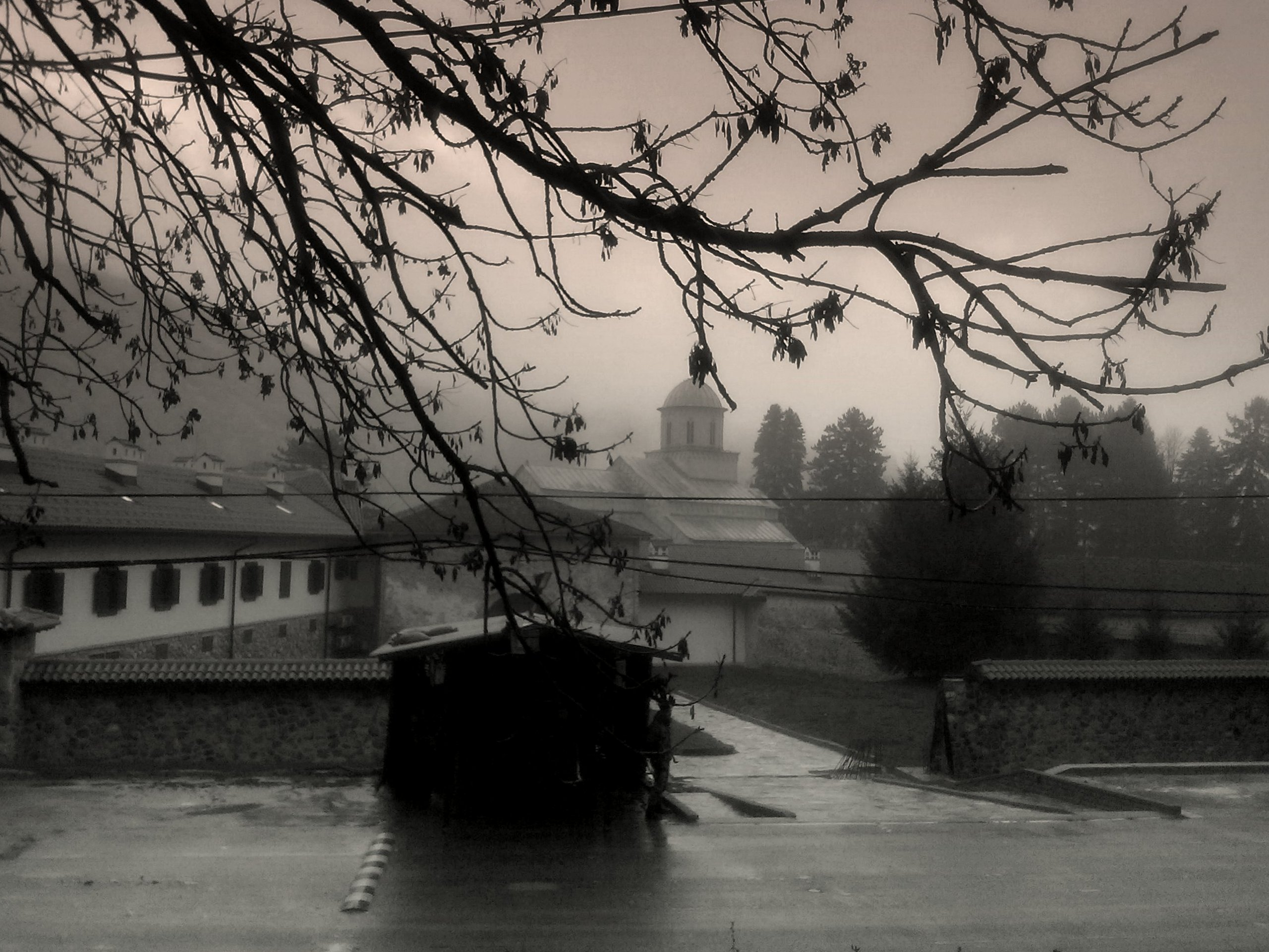 Меморијални природни споменик Високи Дечани